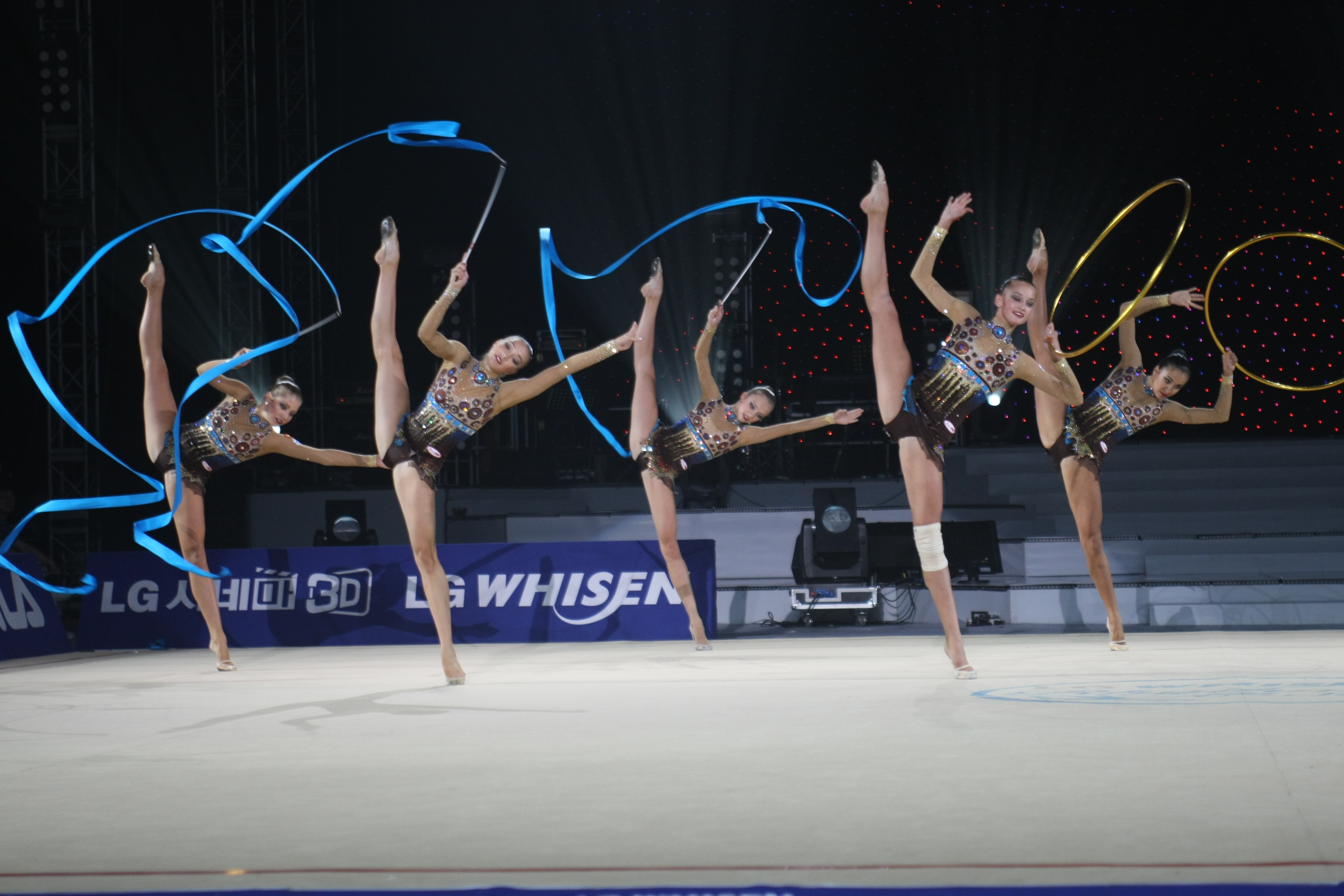 LG전자가 11일(土, 오후 3시), 12일(日, 오후 2시) 양일간 고려대학교 화정체육관 특설무대에서 국내 최초 리듬체조 갈라쇼인 ‘LG WHISEN Rhythmic All Stars 2011’ 행사를 개최했다. 사진은 11일 고려대학교 화정체육관 특설무대에서 열린 ‘LG WHISEN Rhythmic All Stars 2011’ 행사에서 LG ‘휘센’ 광고모델인 손연재(18세, 세종고) 선수를 비롯해 국내외 전•현역 리듬체조 스타들이 총출동해 멋진 리듬체조를 보여줬다.